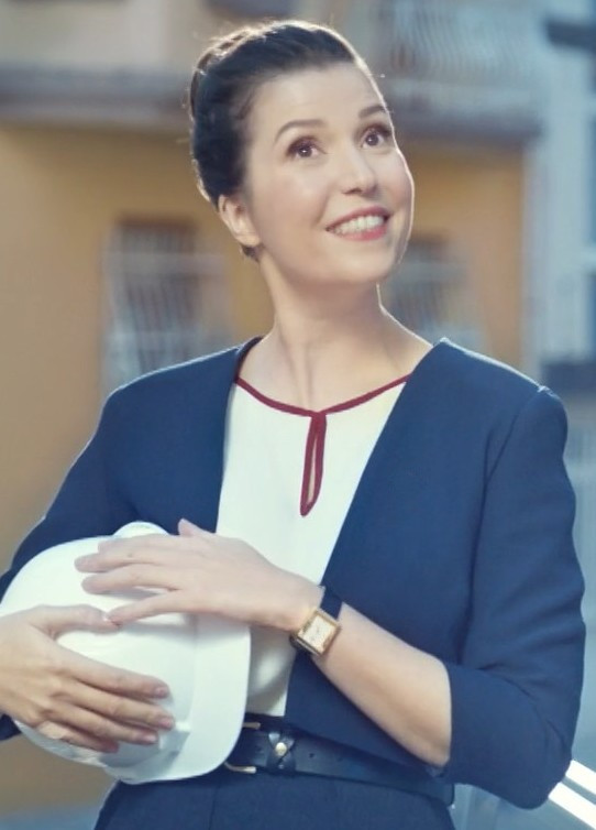 Selma Ergeç'in oynadığı QNB Finansbank reklamından bir kare